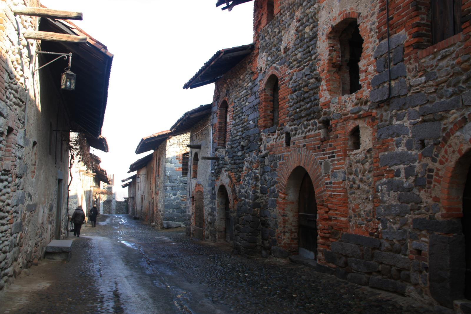 Ricetto di Candelo